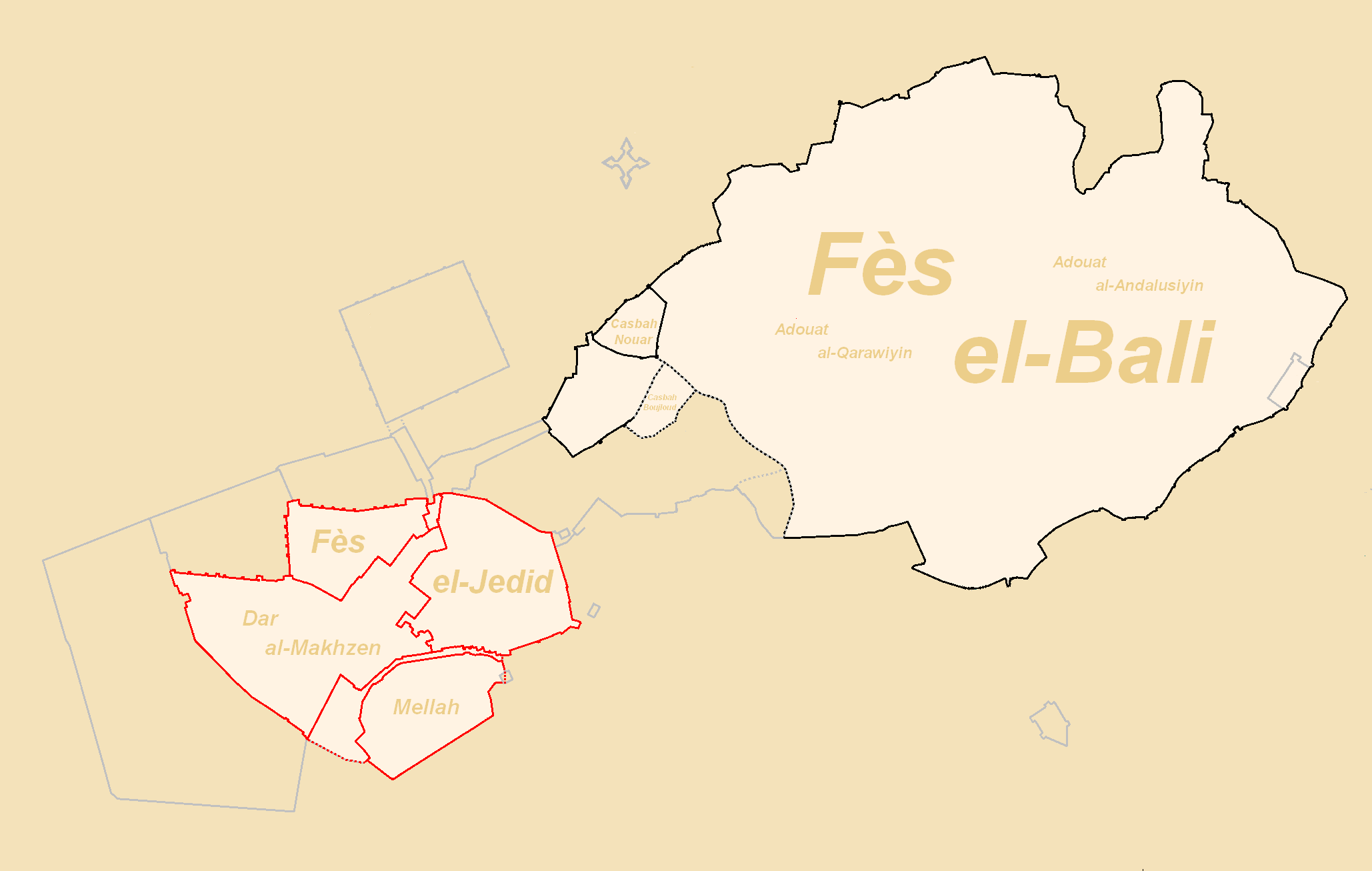 Plan de Fès sous les Mérinides.